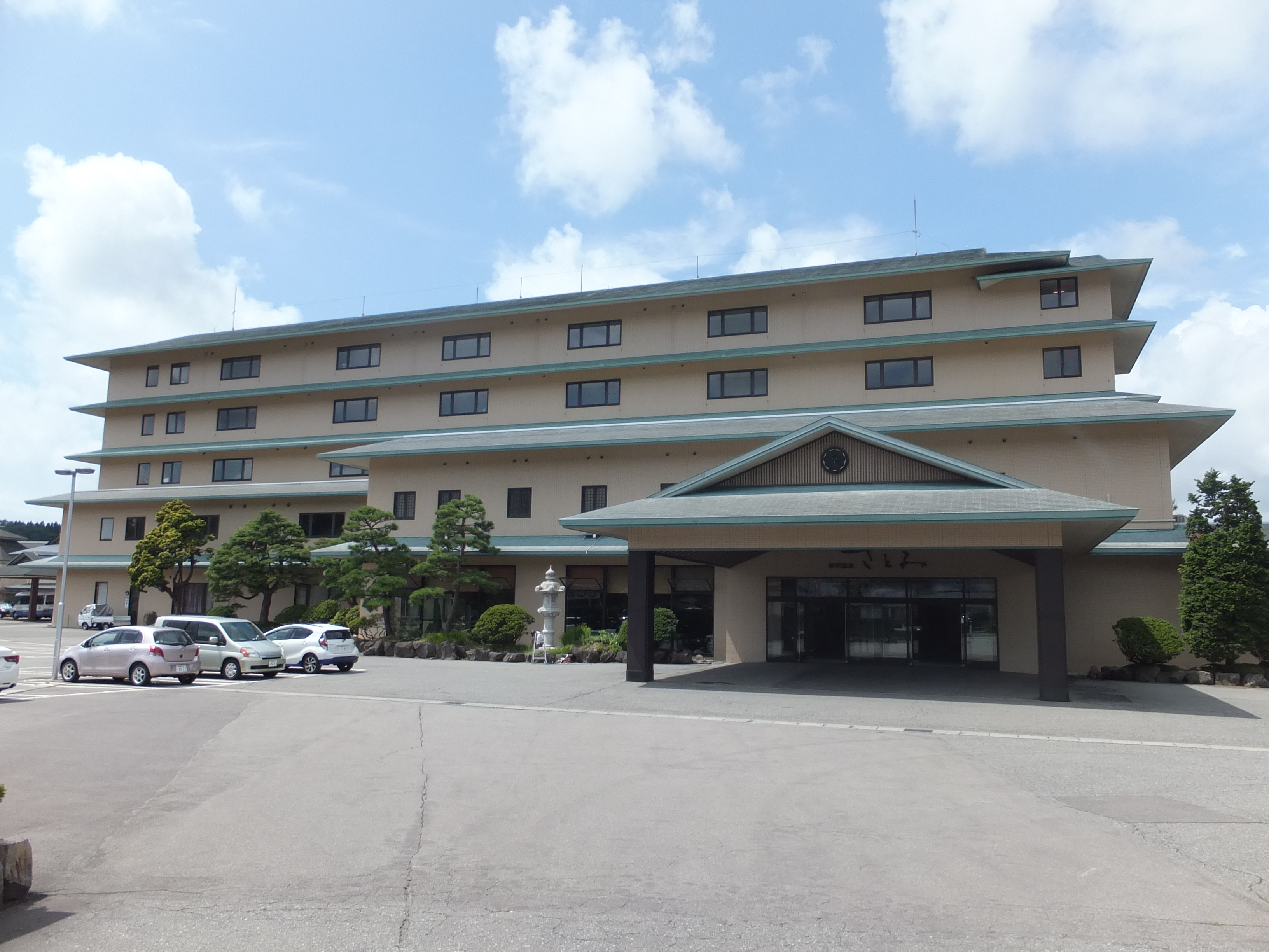 秋田温泉さとみ（秋田市添川）